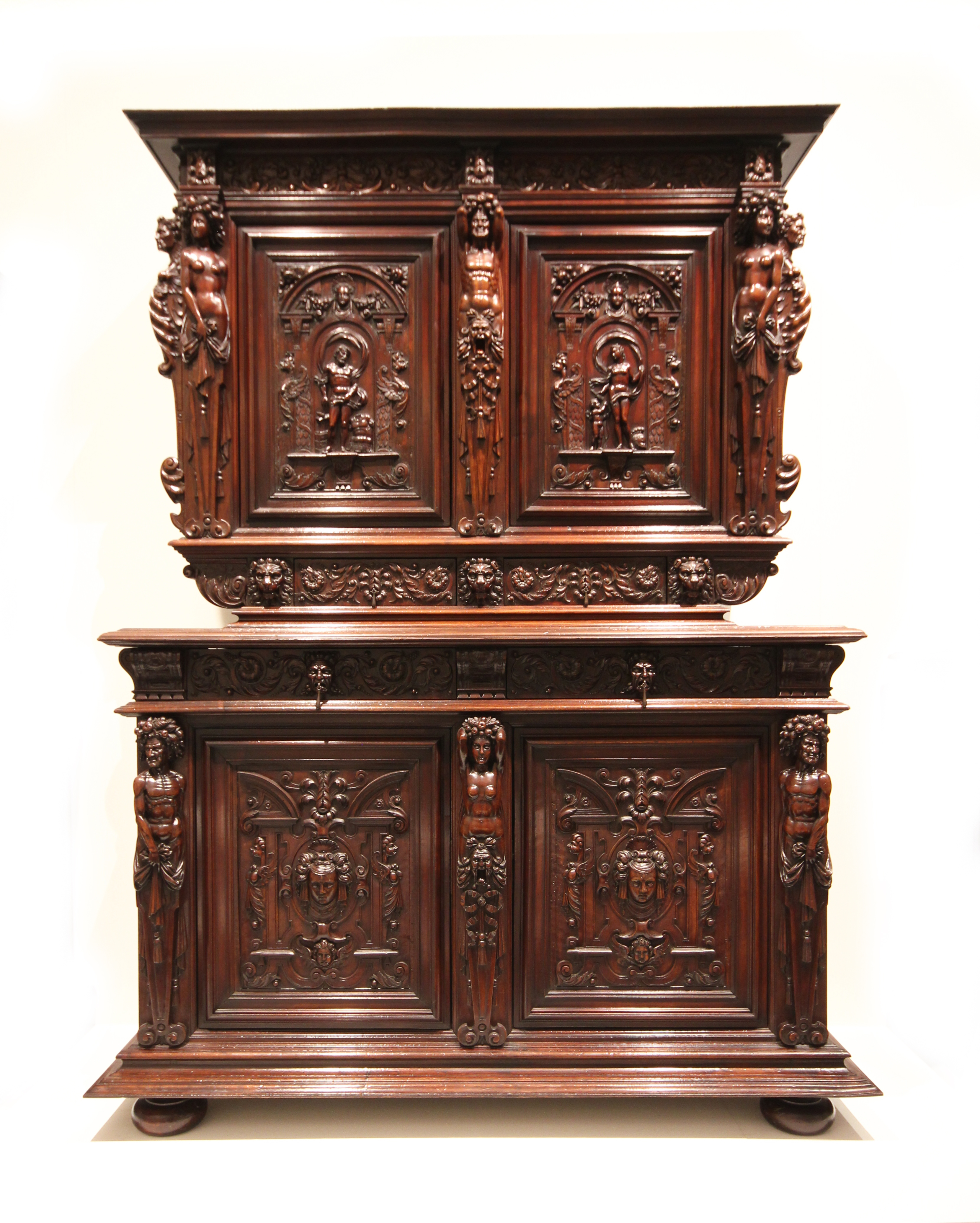 Deuxième moitié du 16ème siècle. Appartient aux collections permanentes du Musée des Beaux-Arts de Lyon.